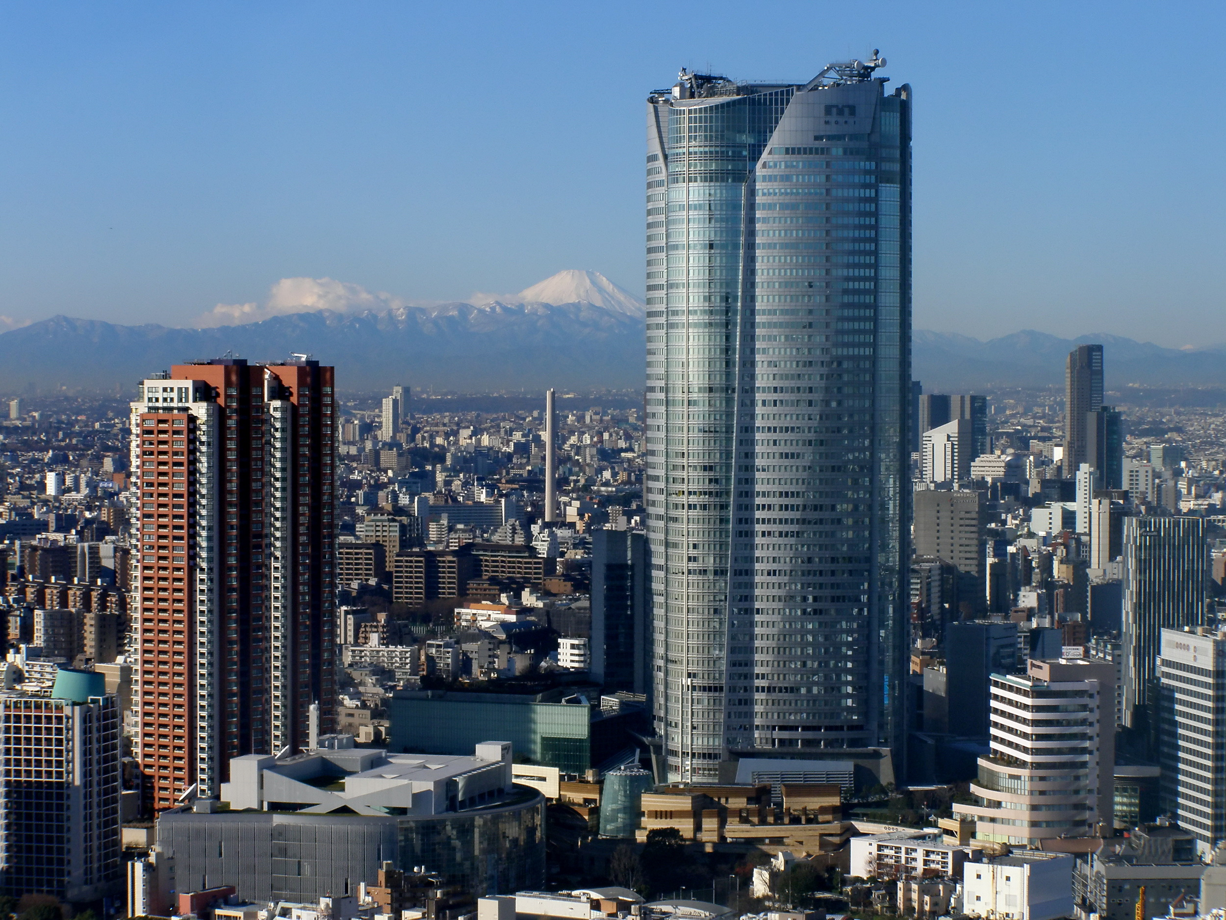 冬の早朝の六本木ヒルズ全景。背後に雪化粧の富士山と、丹沢山地を望む。